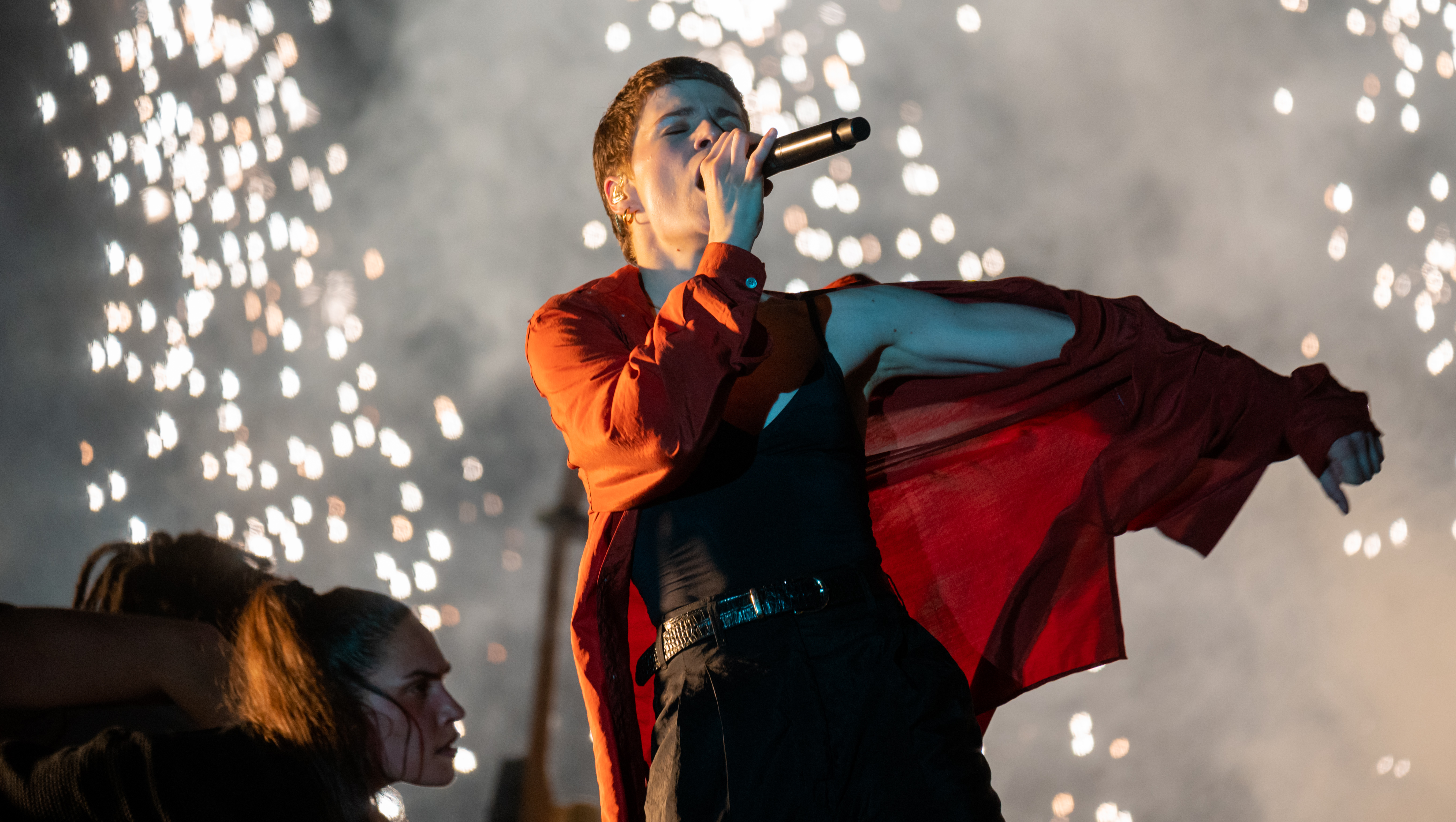 Primavera19_-65